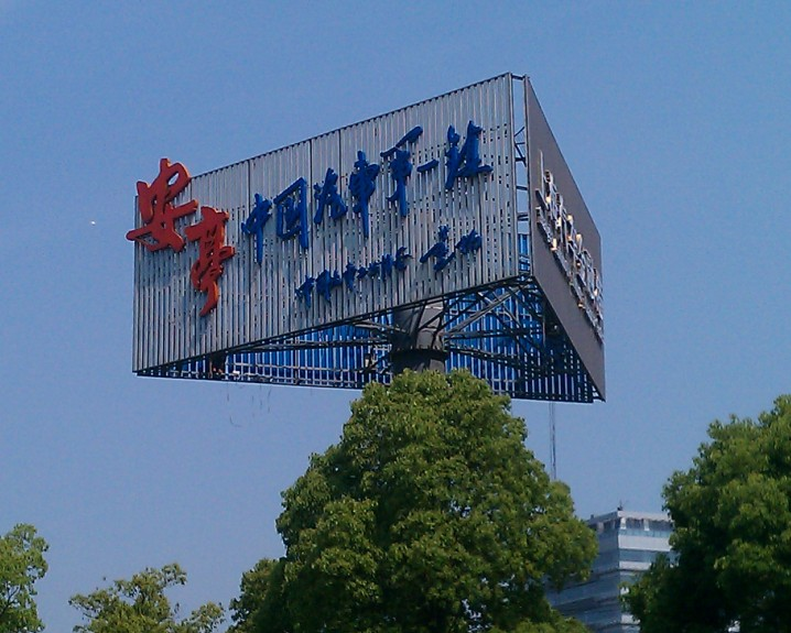 中文（中国大陆）: 安亭-中国汽车第一镇